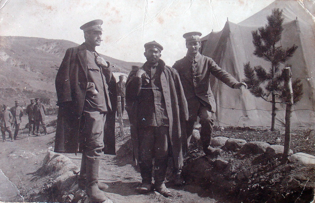 Български войници в Конопище